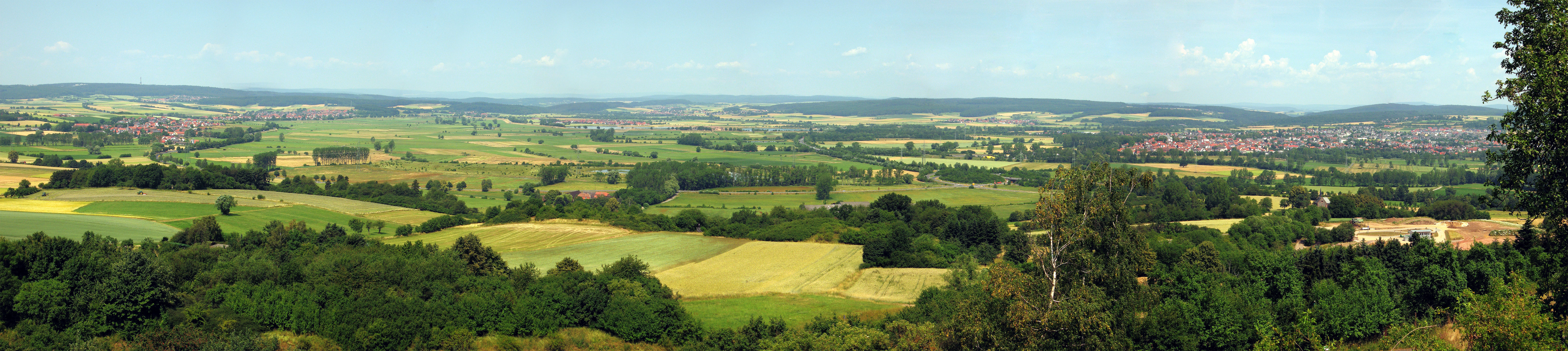 Ohmbecken bei Kirchhain. Man sieht von links nach rechts die Ortsteile Kleinseelheim, Bauerbach (Marburg), Großseelheim, Schönbach, Niederwald, Anzefahr, Stausebach und Kirchhain